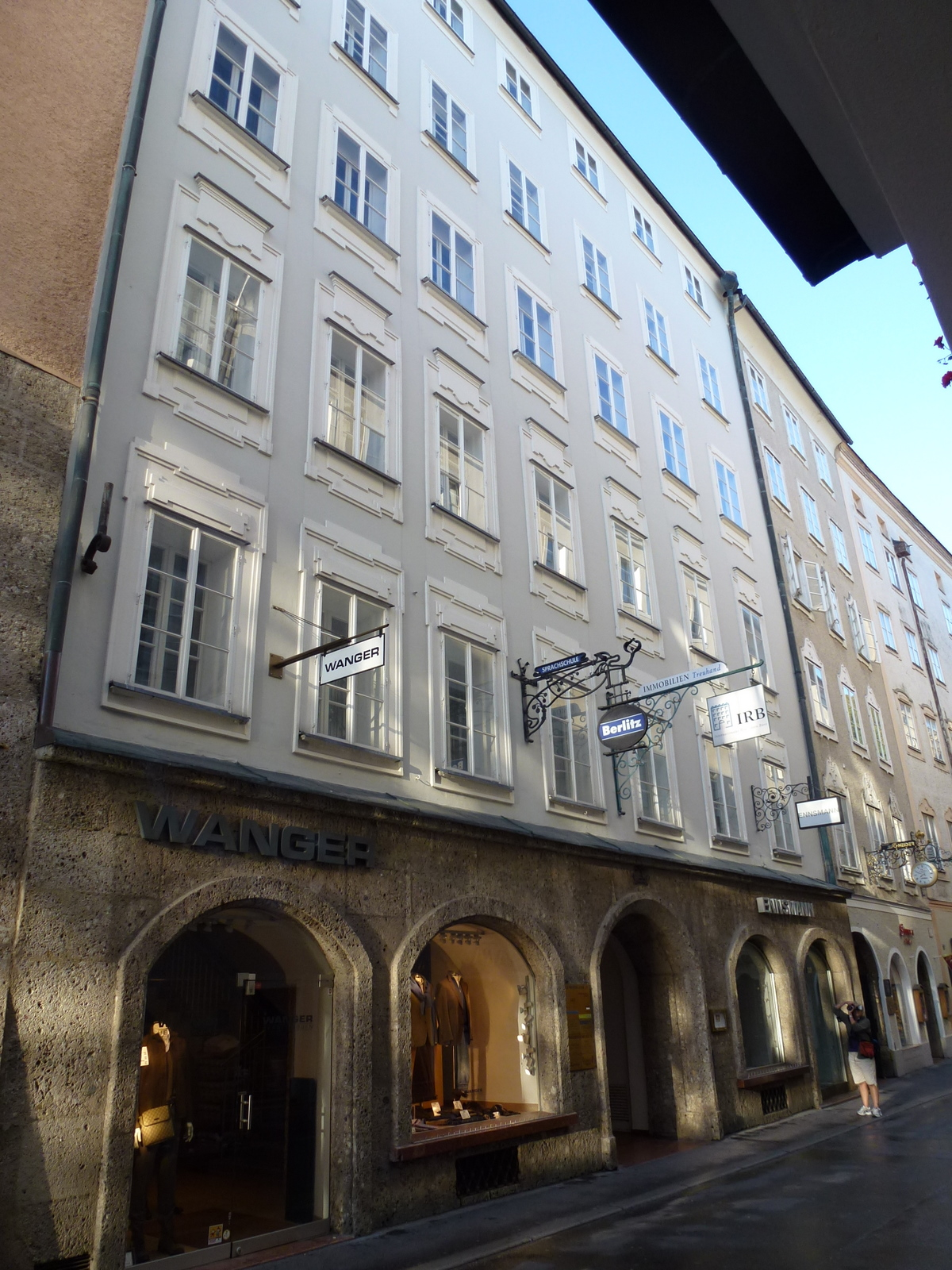 Bürgerhaus, Kaltenbrunnerhaus, Fabrizenhaus